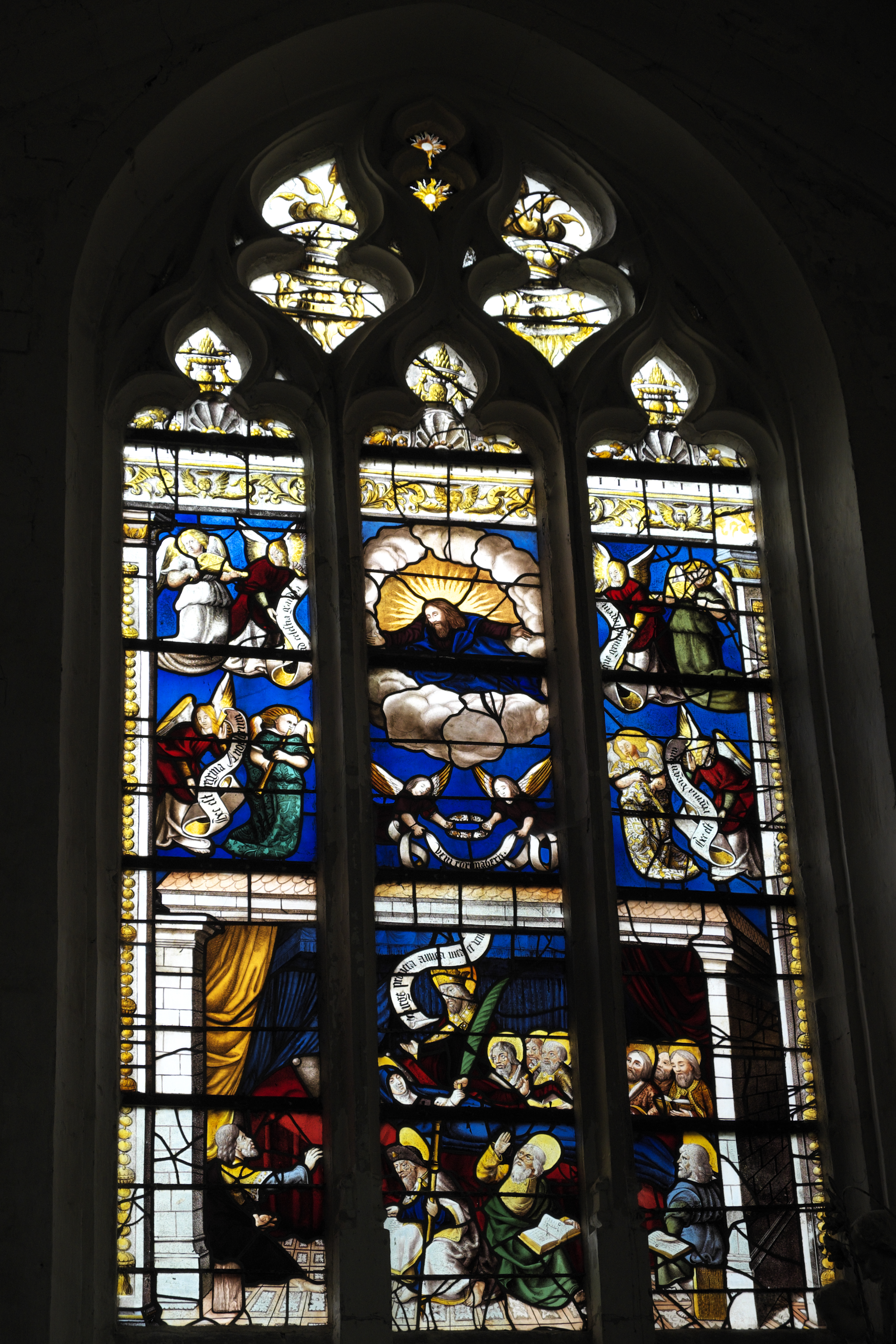 Katholische Kirche Notre-Dame-en-sa-Nativité in Puellemontier im Département Haute-Marne (Champagne-Ardenne/Frankreich), Bleiglasfenster aus dem ersten Viertel des 16. Jahrhunderts; Darstellung: Marientod (unten), Marienkrönung (oben) .